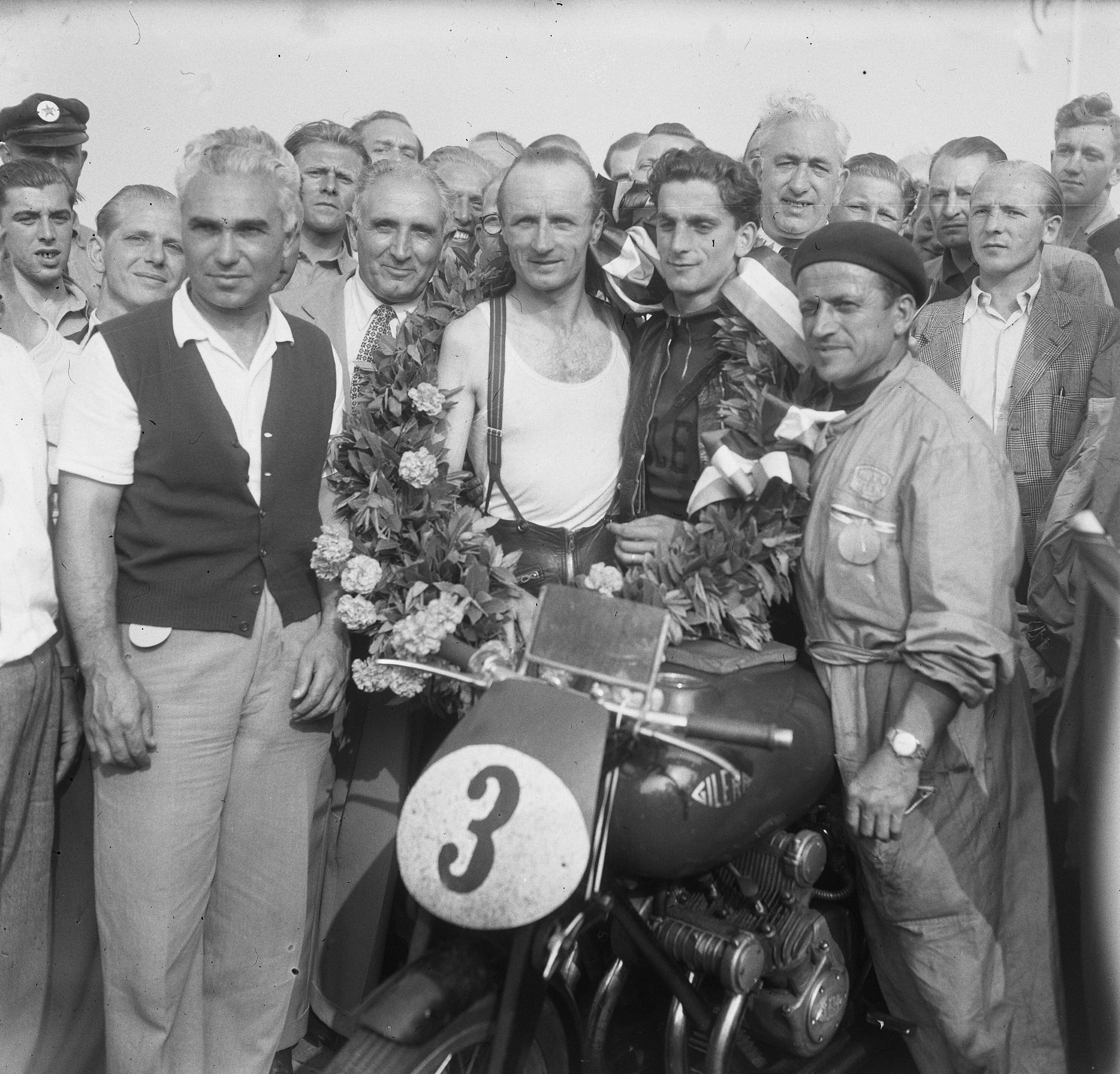 Collectie / Archief : Fotocollectie Anefo Reportage / Serie : [ onbekend ] Beschrijving : T.T. races Assen. Umberto Masetti (winnaar 500cc) (r) en Nello Pagani (l) Datum : 8 juli 1950 Locatie : Assen, Drenthe Trefwoorden : motorsport, sport Persoonsnaam : Masetti, Umberto, Pagani, Nello Fotograaf : Winterbergen, […] / Anefo Auteursrechthebbende : Nationaal Archief Materiaalsoort : Glasnegatief Nummer archiefinventaris : bekijk toegang 2.24.01.09 Bestanddeelnummer : 904-0667